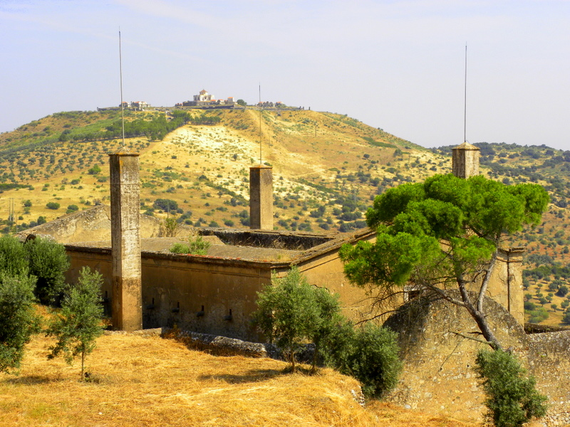 Elvas - Paiol de Santa Bárbara e Forte de Nossa Senhora da Graça